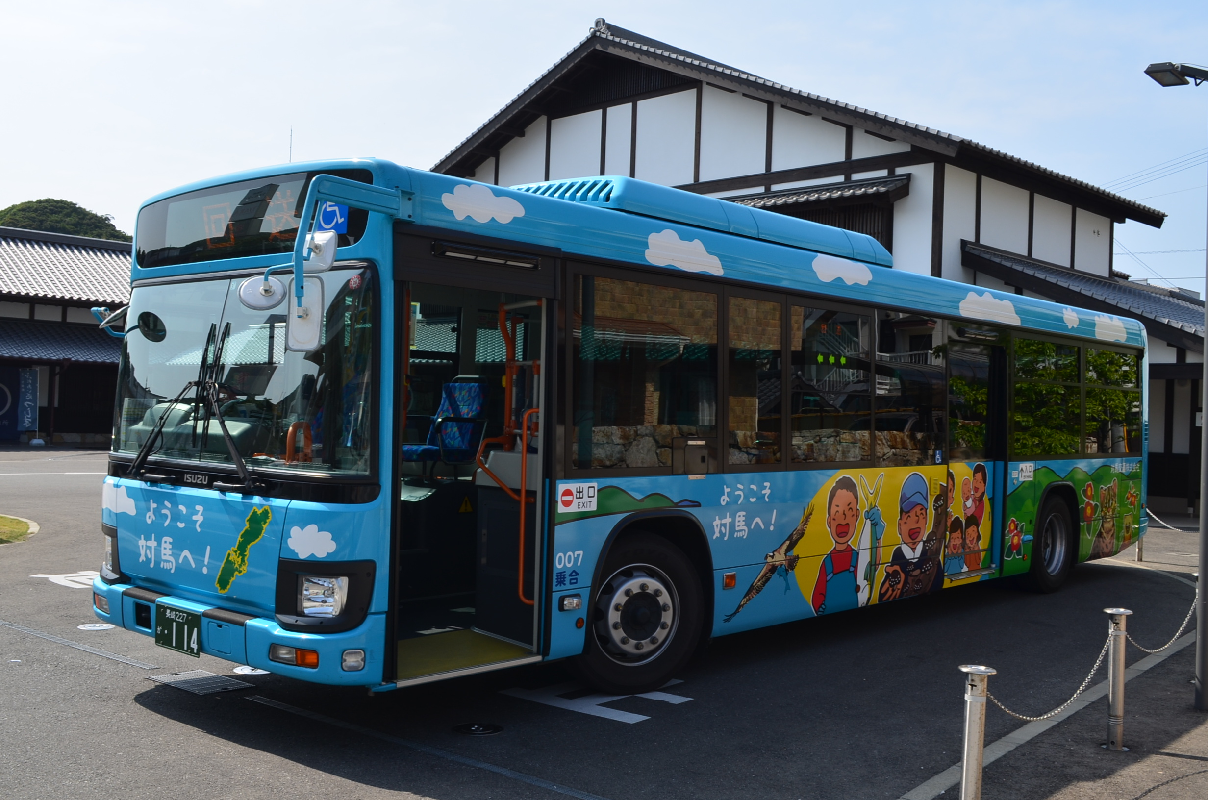 対馬交通007号車。2017年6月3日、長崎県対馬市・ふれあい処つしまにて撮影